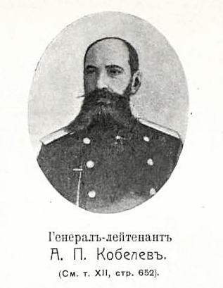 Александр Павлович Кобелев. Эта фотография была использована для иллюстрирования статьи «Кобелев, Александр Павлович» опубликованной в двенадцатом томе «Военной энциклопедии», который был издан книгоиздательским товариществом И. Д. Сытина в 1913 году в столице Российской империи городе Санкт-Петербурге (само фото было опубликовано уже в тринадцатом томе в том же году). Более подробное описание к этой картинке можно прочесть в указанной выше статье.